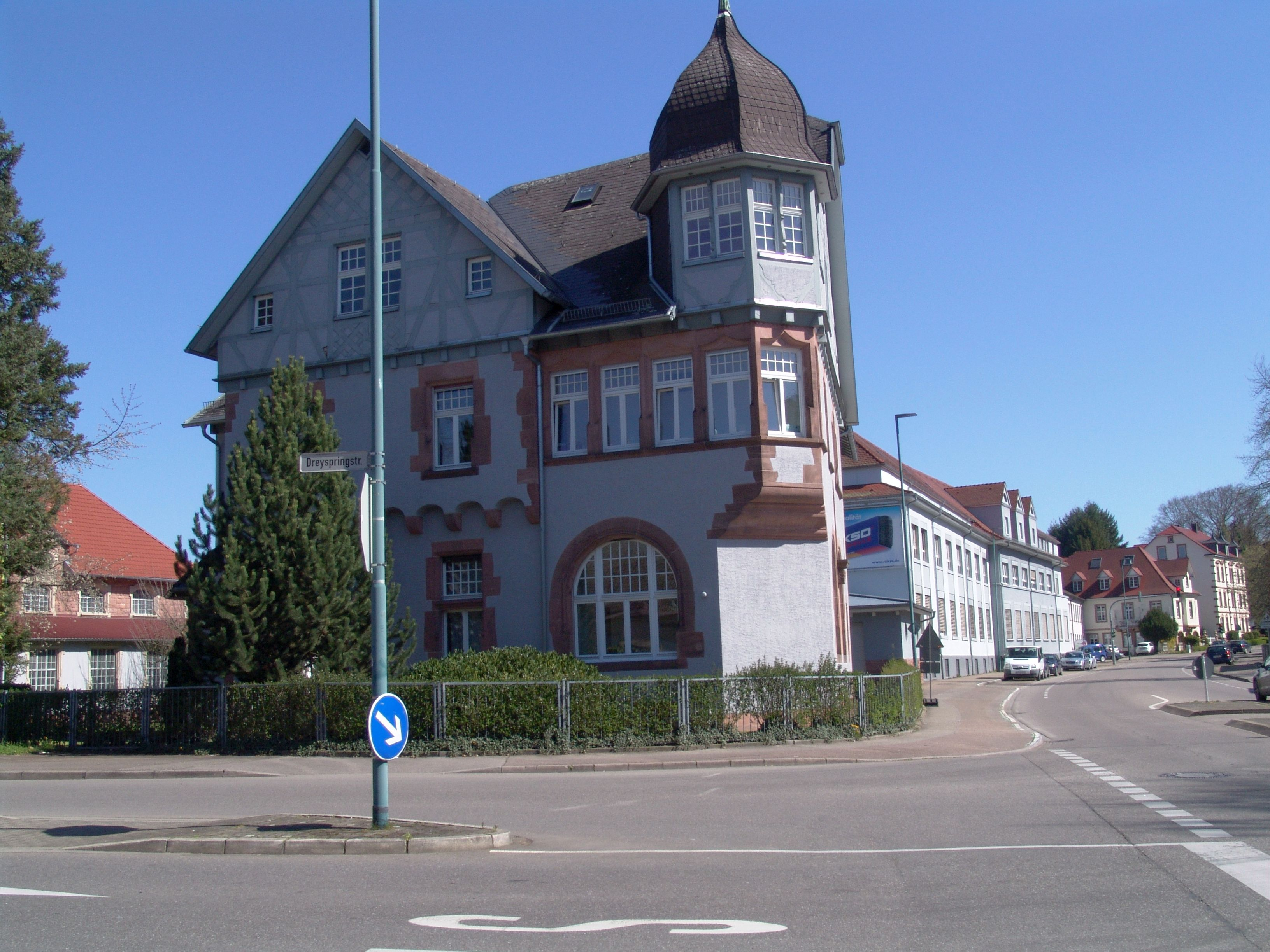 Oscar Weil GmbH Verwaltungsgebäude